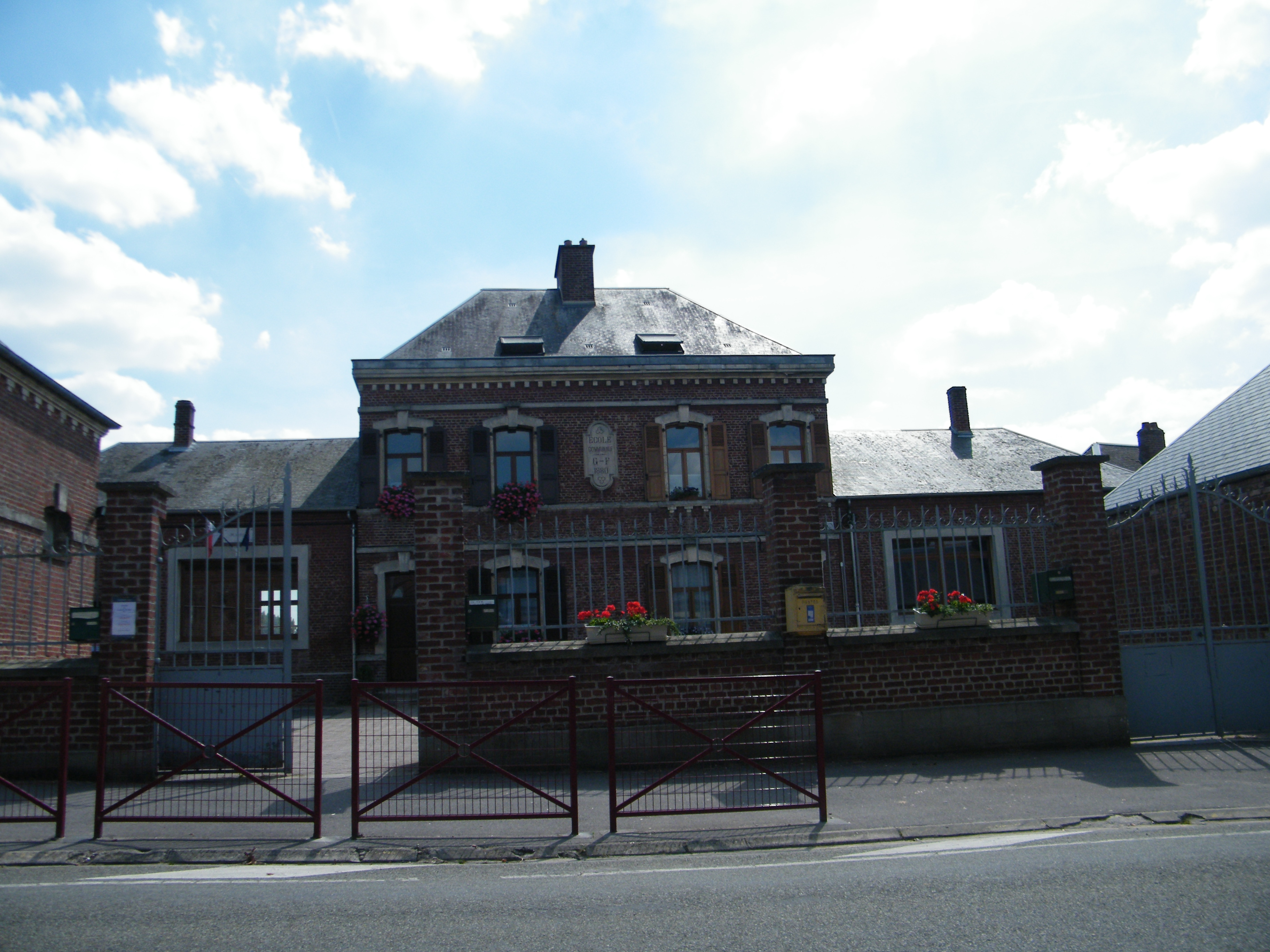 Mairie-école.